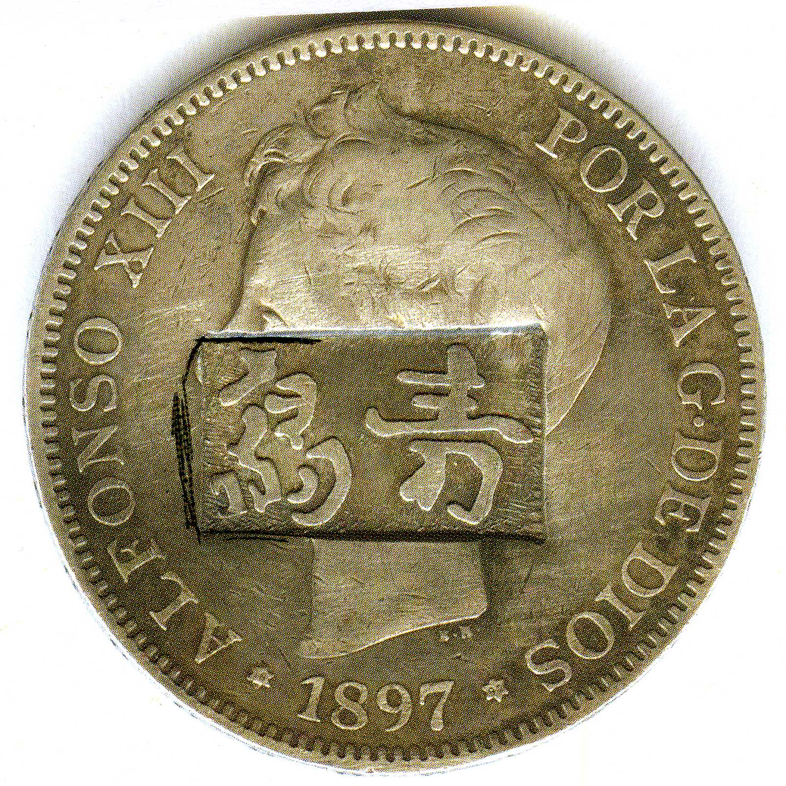 Moneda española con contramarca que circuló en Kiau Chau.